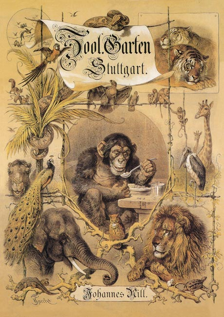 Plakat von Friedrich Specht für Nills Tiergarten in Stuttgart, ca. 1885–1900, signiert: FSpecht.